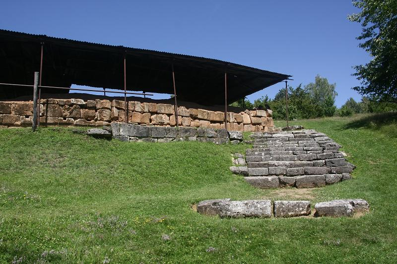 turn "Cetatuia" de aparare a cetatii Sarmizegetusa 02